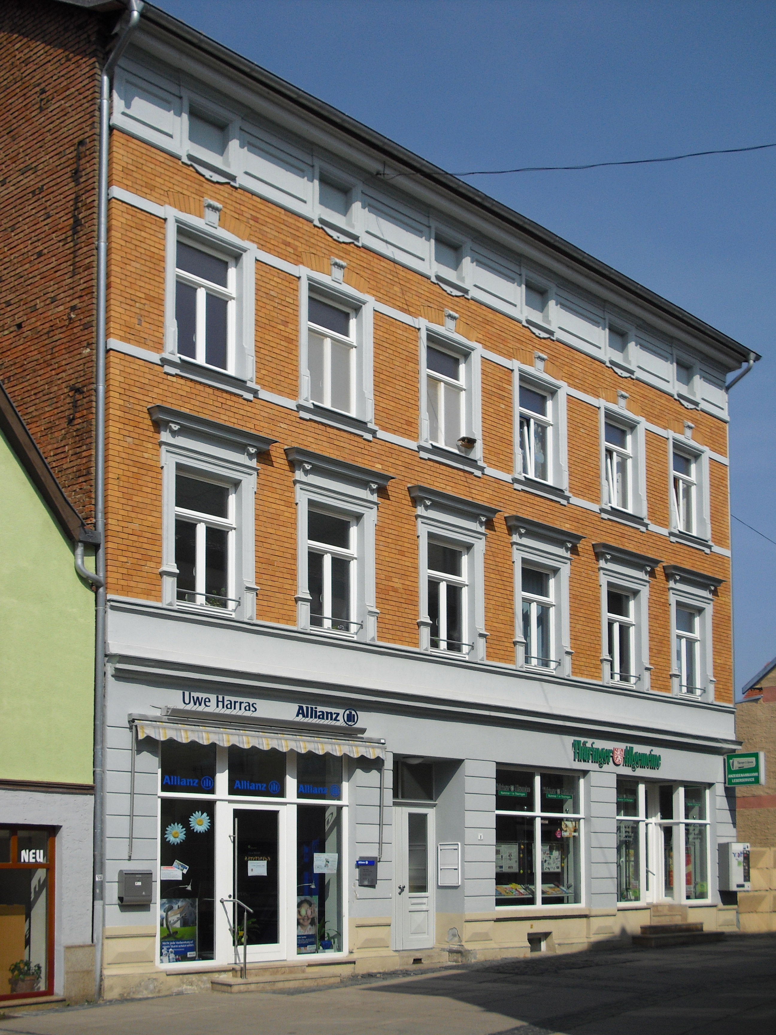 Pressehaus Apolda